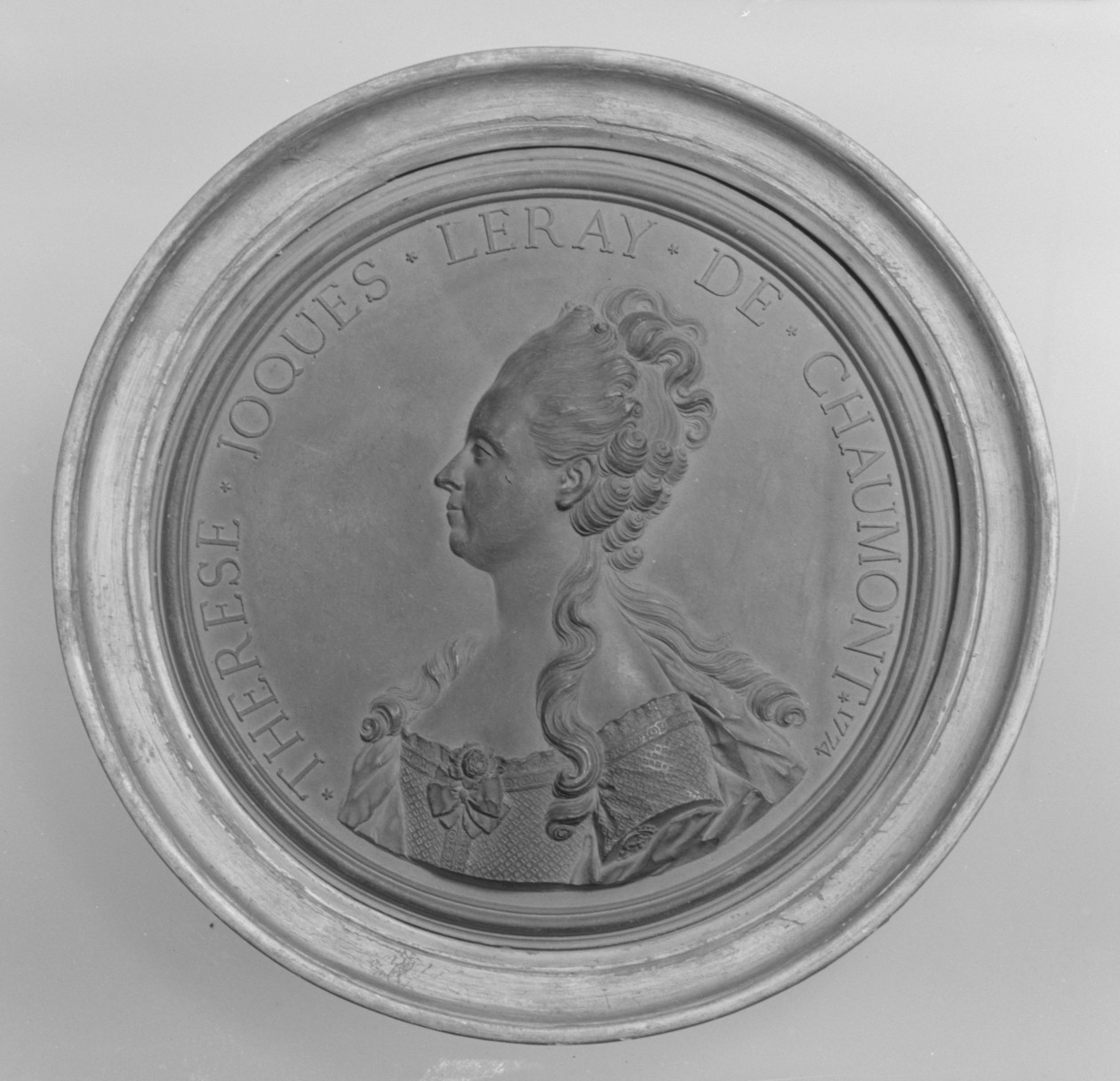 French, Chaumont-sur-Loire; Medallion; Sculpture-Miniature